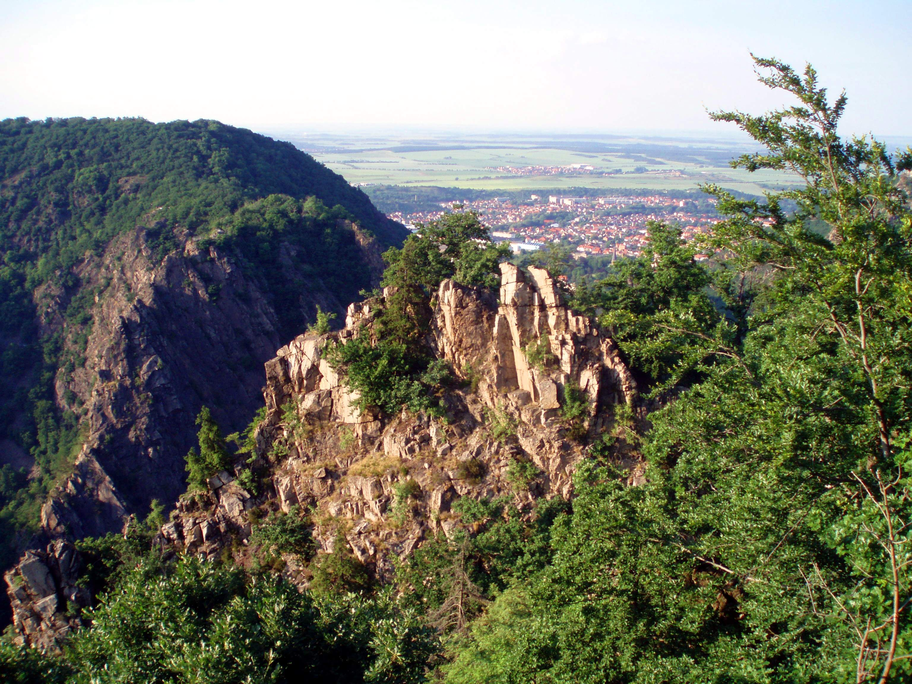 Im Harz.